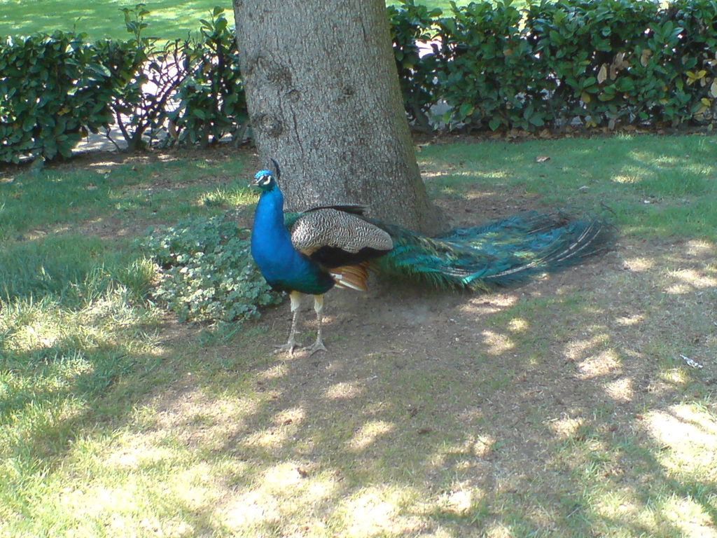 Parque de Quevedo, León